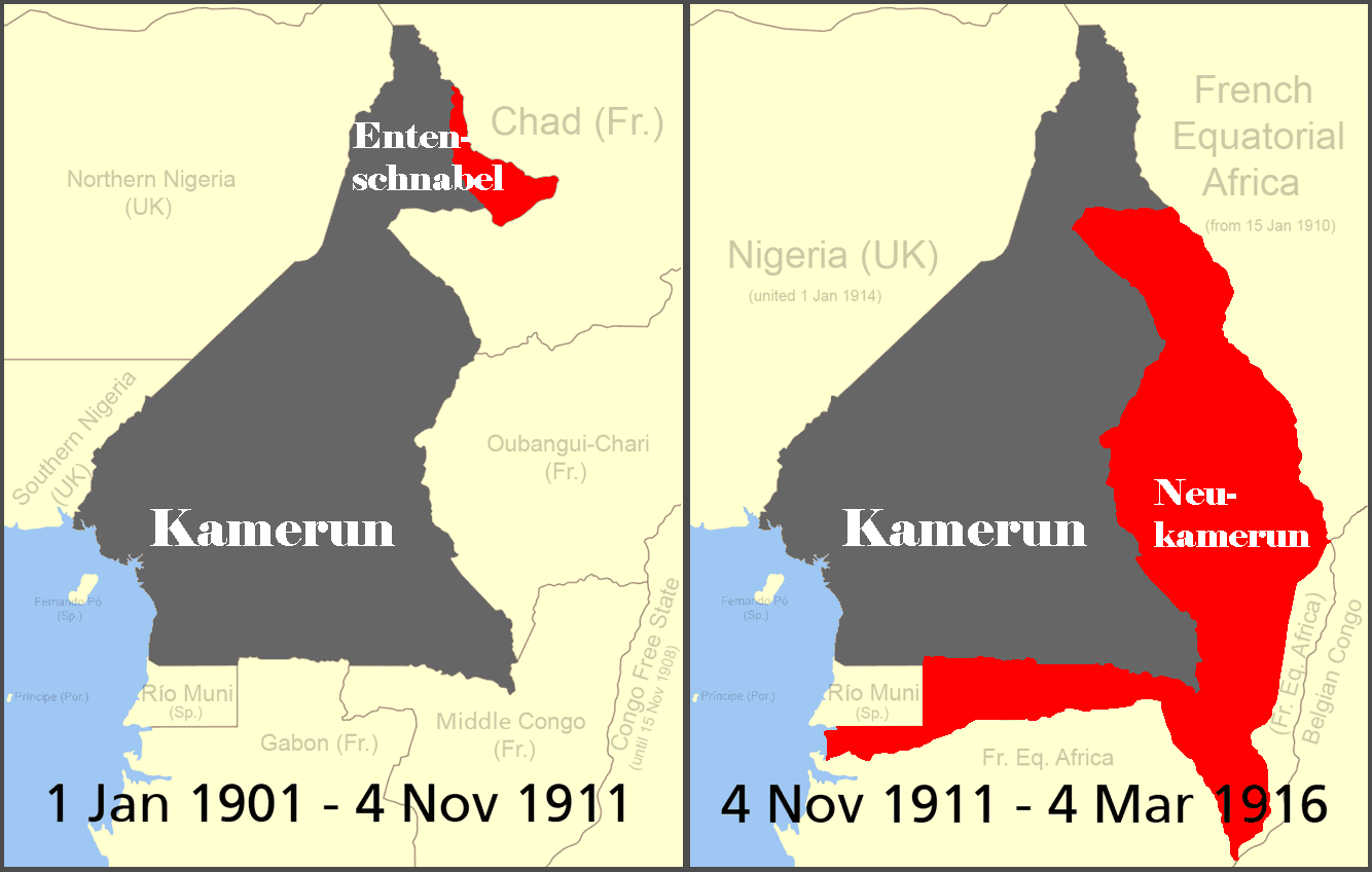 Kameruner Entenschnabel und Neukamerun (rot) zwischen 1901 und 1911